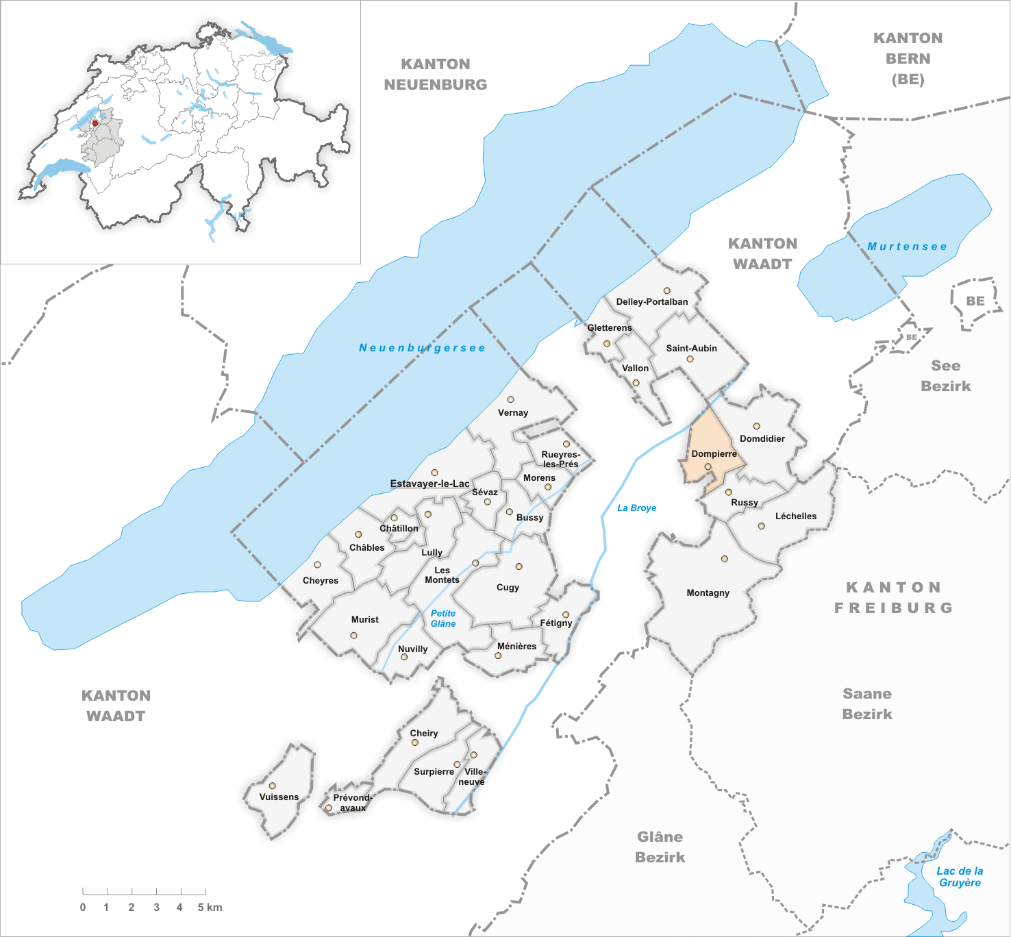 Municipality Dompierre